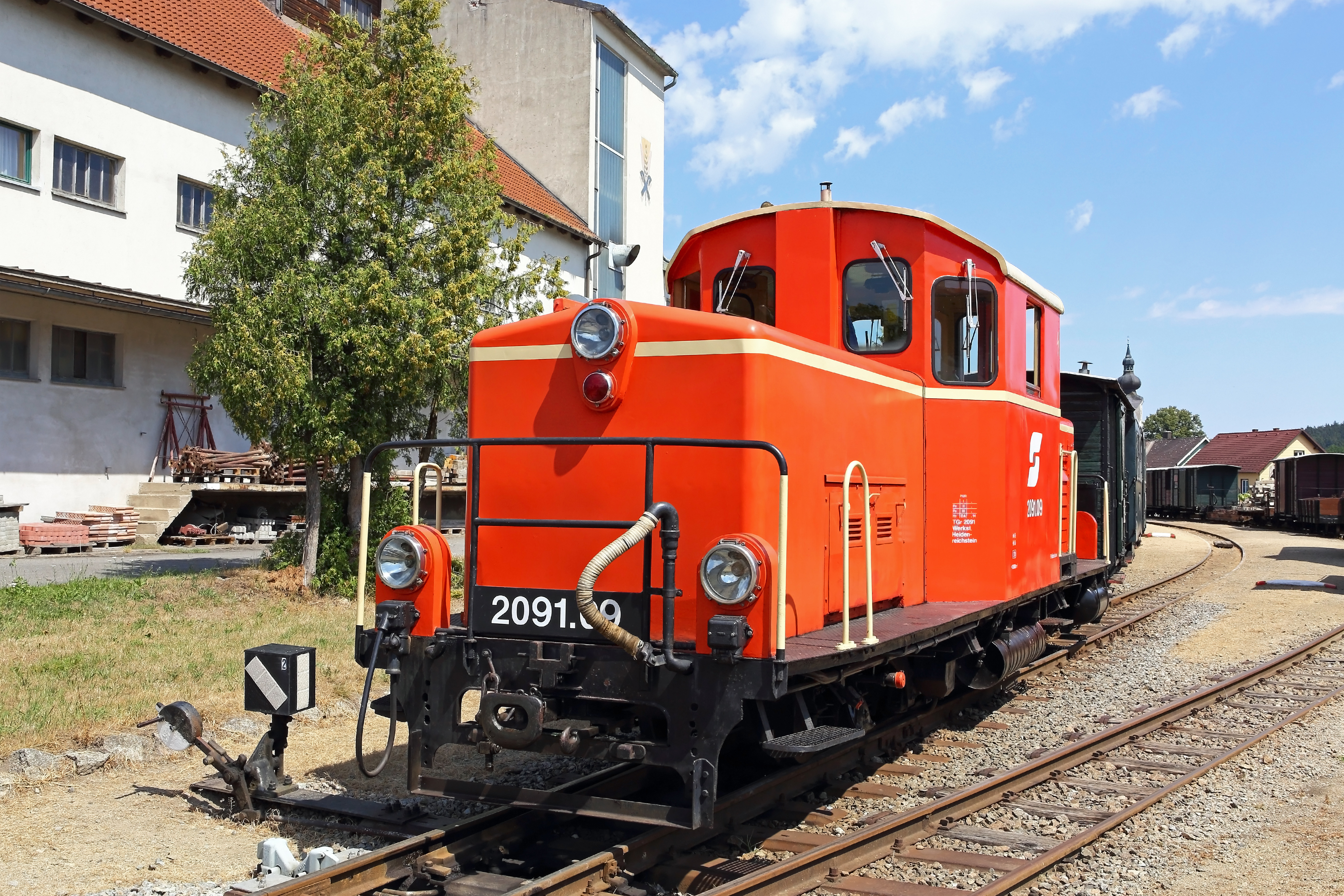 Diesellok 2091.09 (Bj 1940) des Waldviertler Schmalspurbahnvereines am Bahnhof Heidenreichstein.